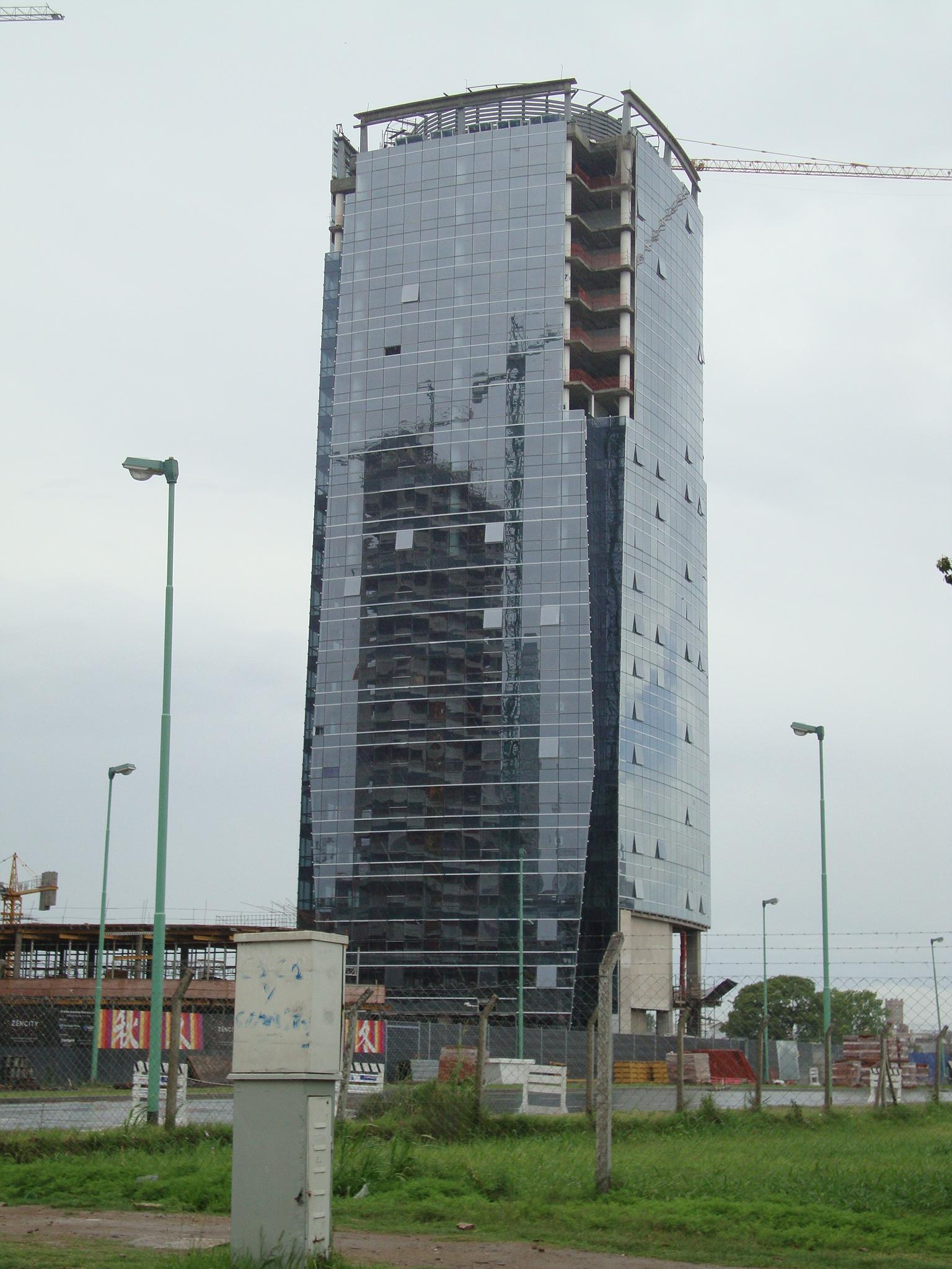 La primera torre de oficinas del complejo Madero Harbour, en construcción en noviembre de 2009.